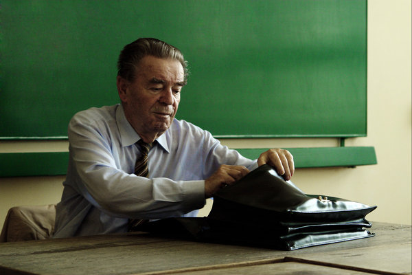 Milan Kangrga, Filozofski fakultet u Zagrebu